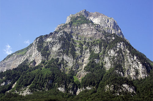 Vorder-Glärnisch bei Glarus